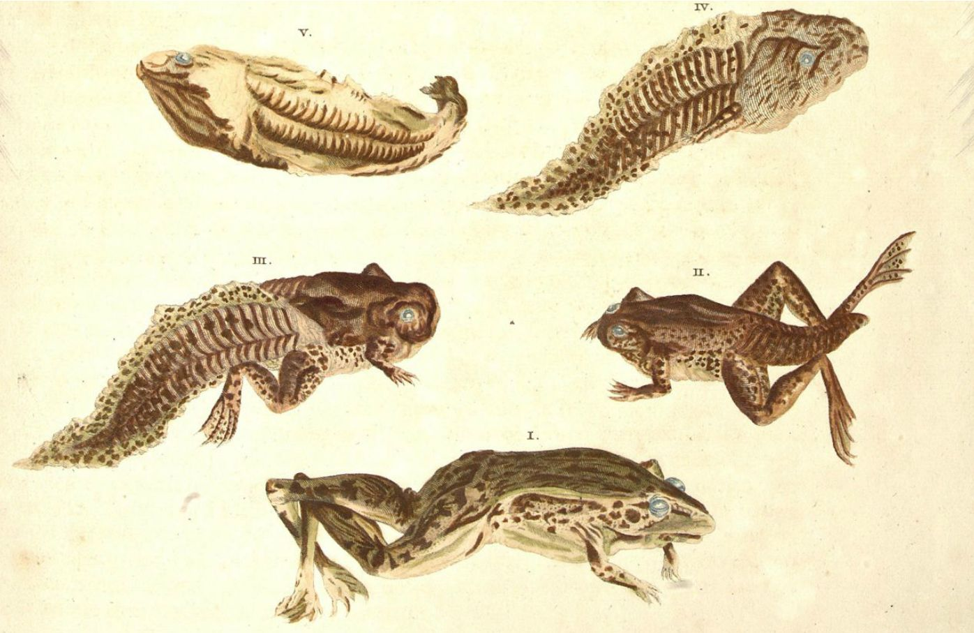 Bottom part of plate LXXI. from Veranderingen der surinaemsche insekten, Amsterdam, Joannes Oosterwyk, 1719